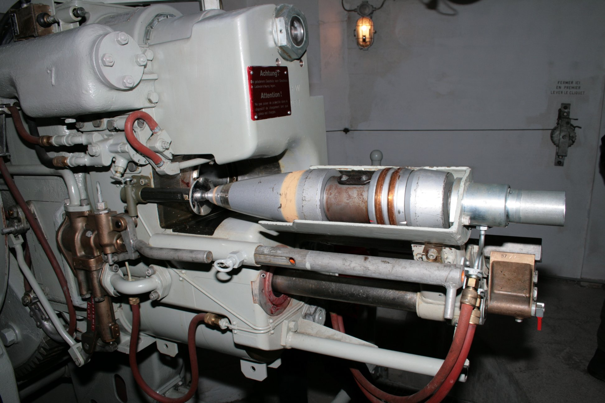 10.5 cm Panzerabwehrkanone (Festungsgeschütz)